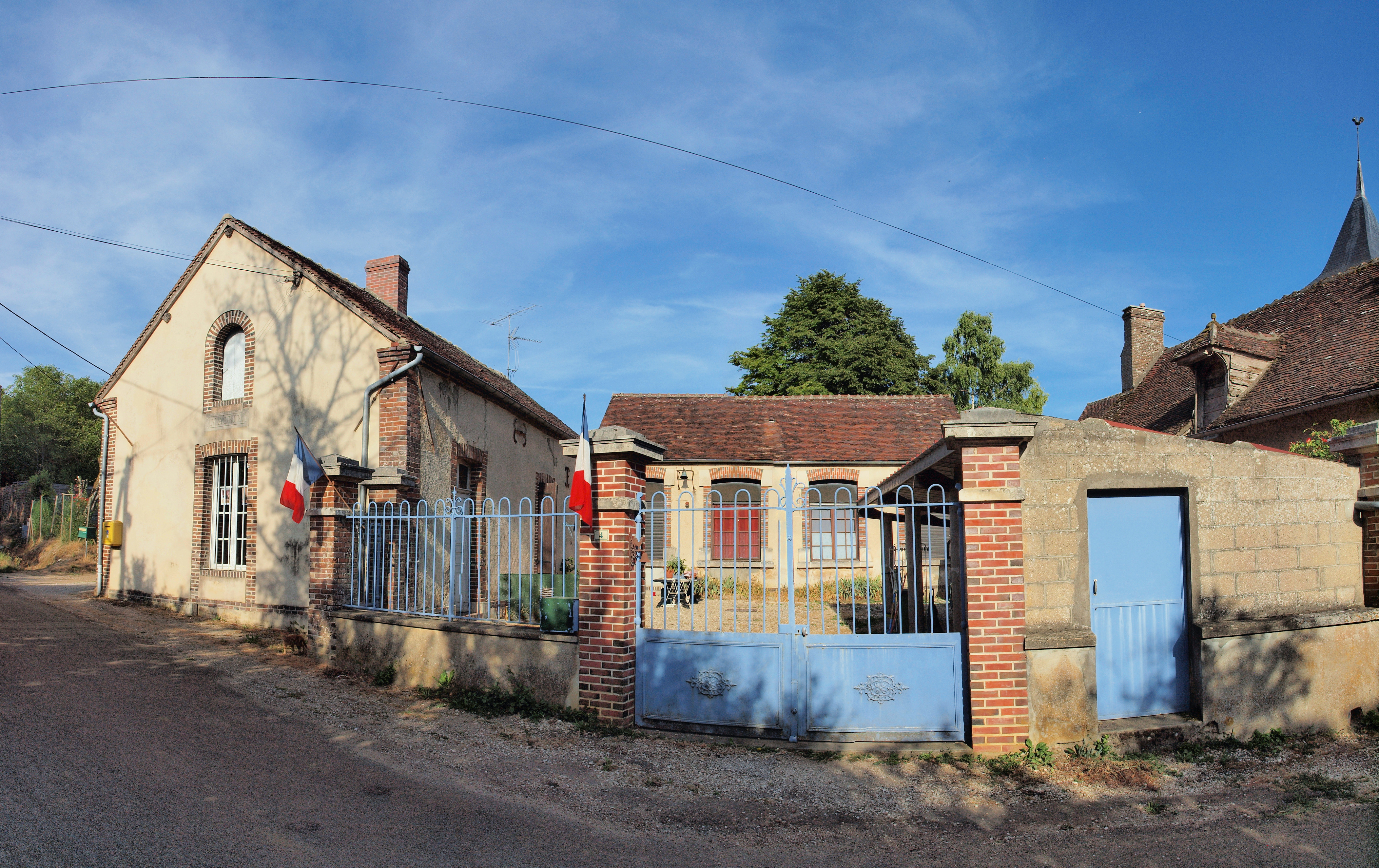 Mairie de La Villotte (Yonne, France)